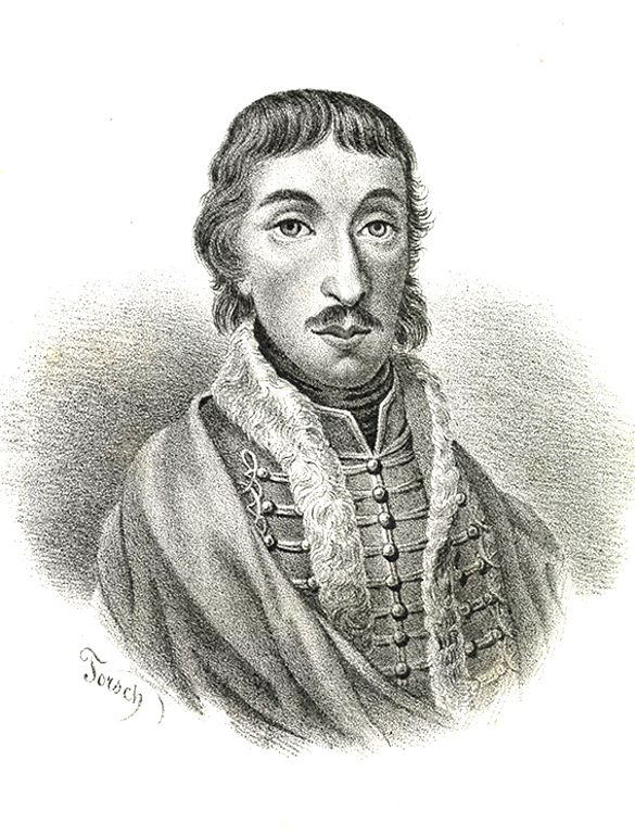 Csokonai Vitéz Mihály (Debrecen, 1773. november 17. – Debrecen, 1805. január 28.) költő.